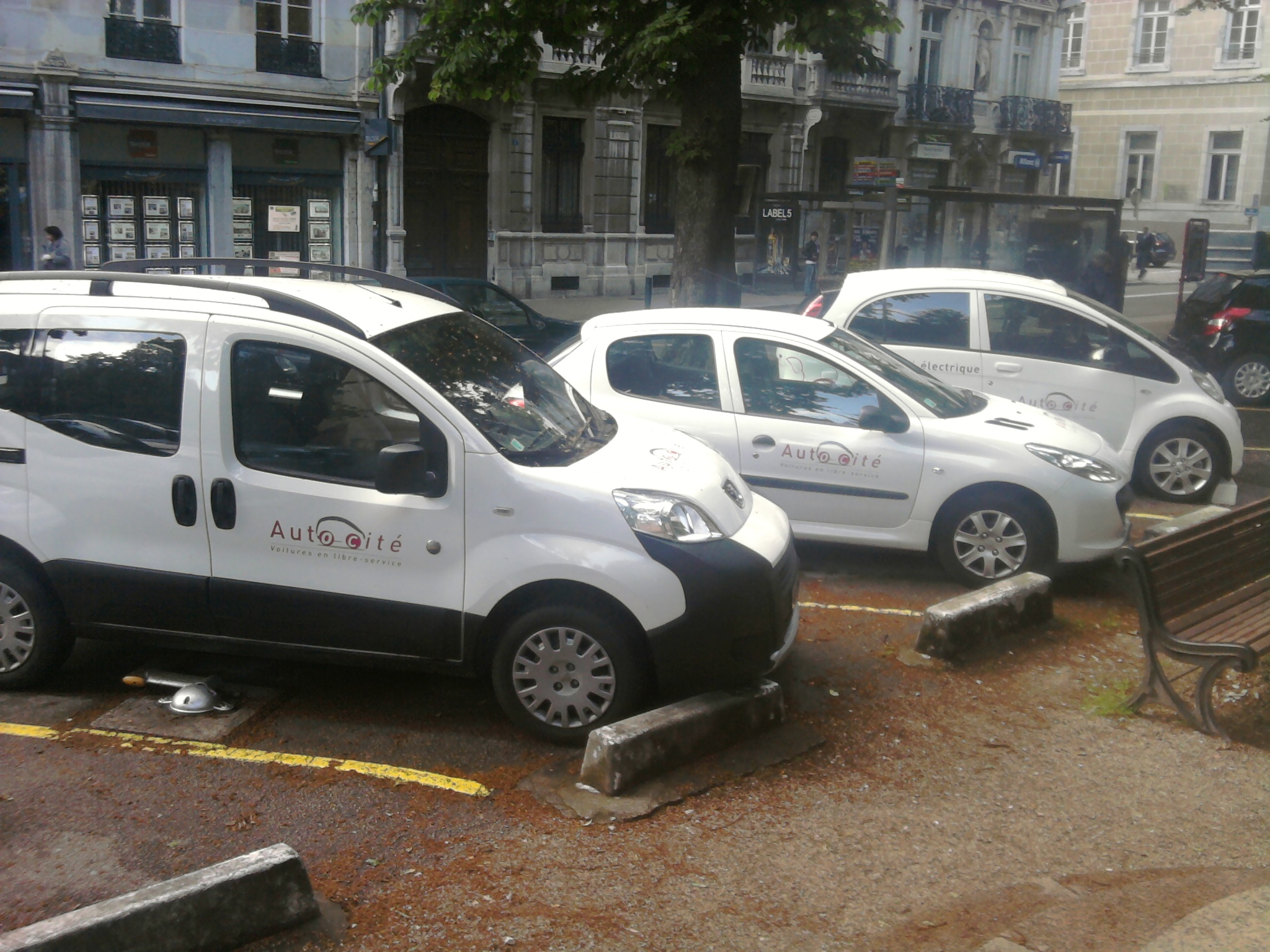 Exemple de trois modèles du parc de voiture en libre service Auto'cité, à Granvelle-Besançon.